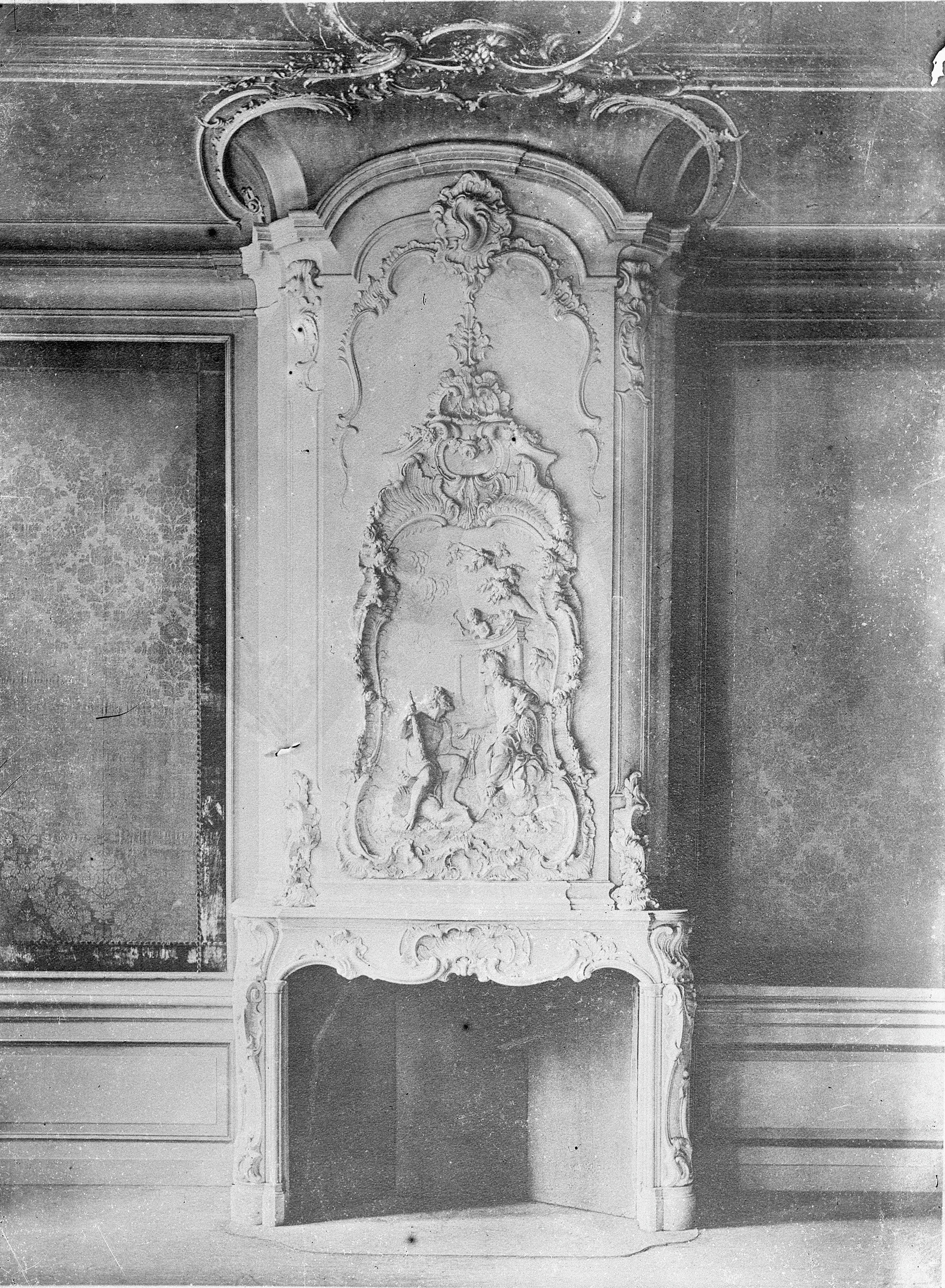 Schoorsteen: Reproductie van foto van schoorsteen (opmerking: Uit: Oude Binnenhuizen in Nederland)